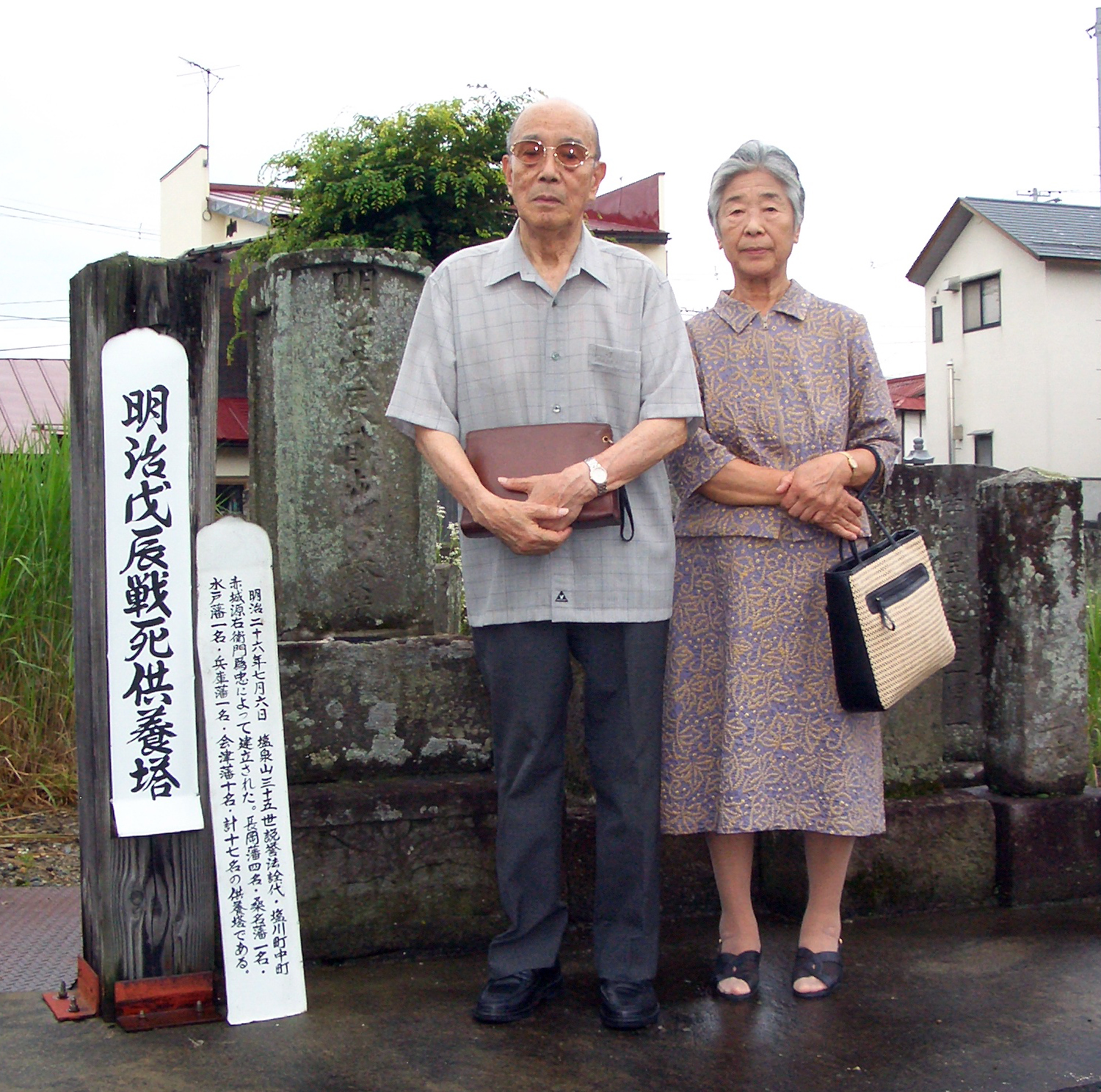 2006/7/18に戊辰戦争で亡くなった先祖鳥飼正時の足跡をたどって、会津若松に旅行した折に、塩川阿弥陀寺にあるここに埋葬されたことを示す供養塔の前で父鳥飼正義・母衣子を撮影したもの